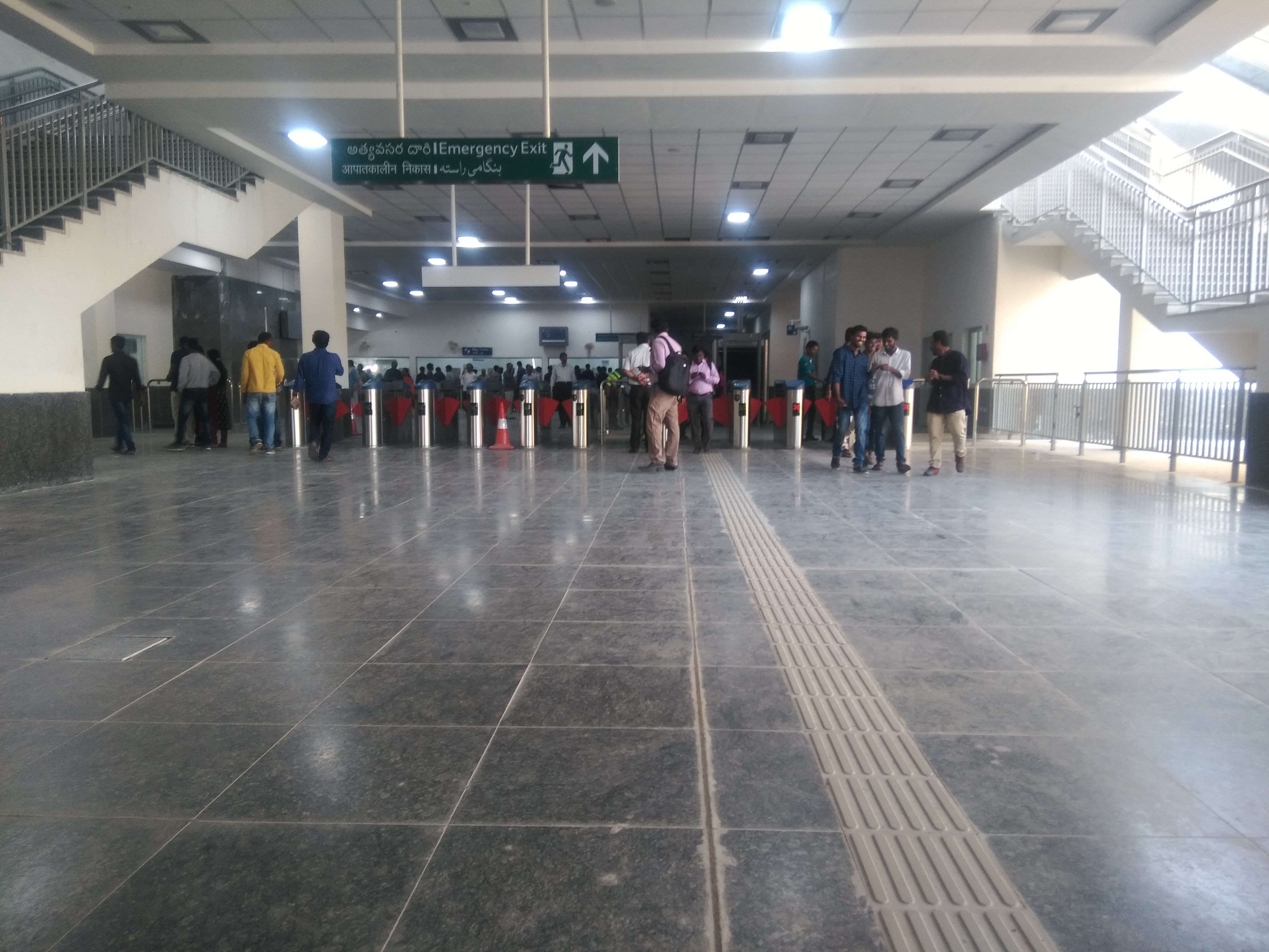 Ameerpet metro station